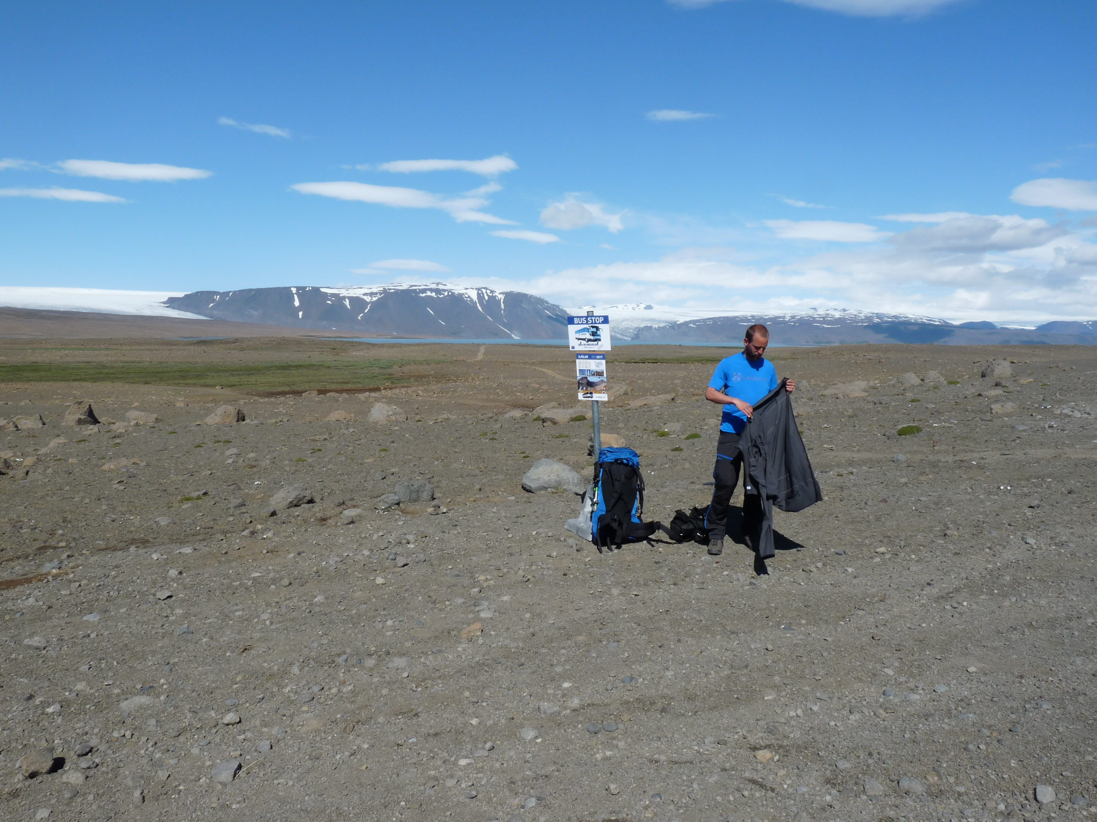 Busstop Hvítárnes/Crossroads in het hoogland van IJsland op de busdienst 610